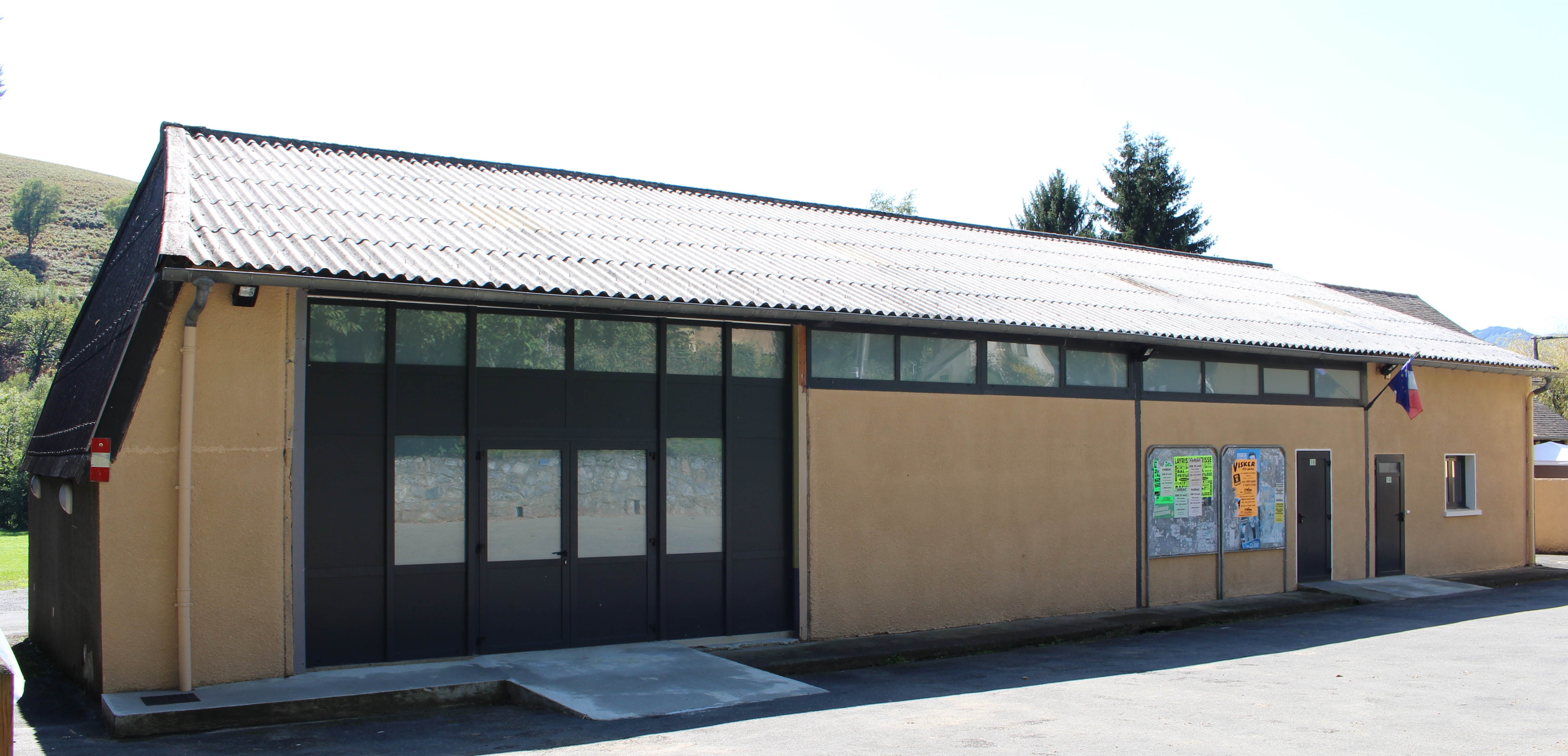 Salle des fêtes de Paréac (Hautes-Pyrénées)